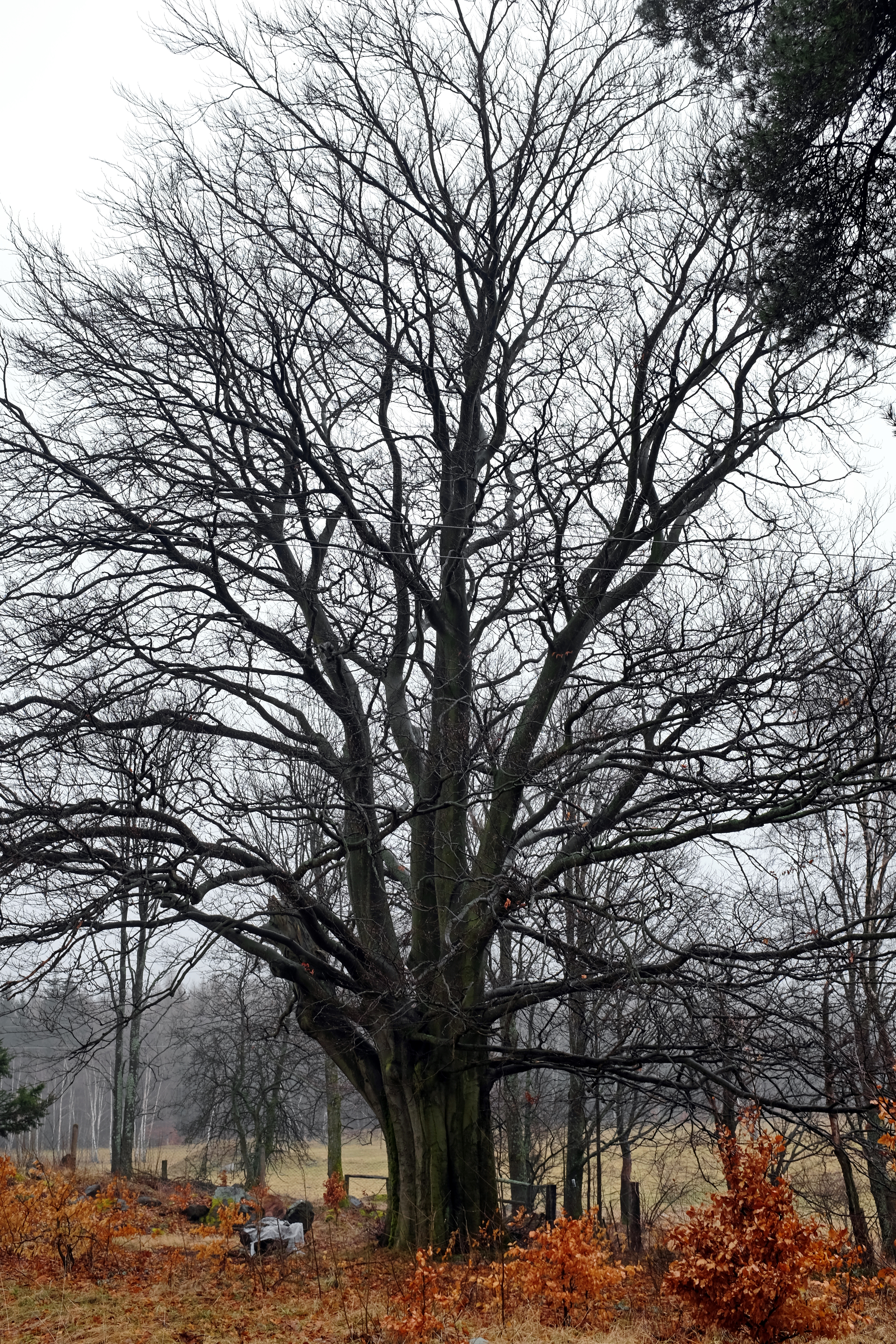 Památný strom - Buk nad Hruškovou, Hrušková, okres Sokolov